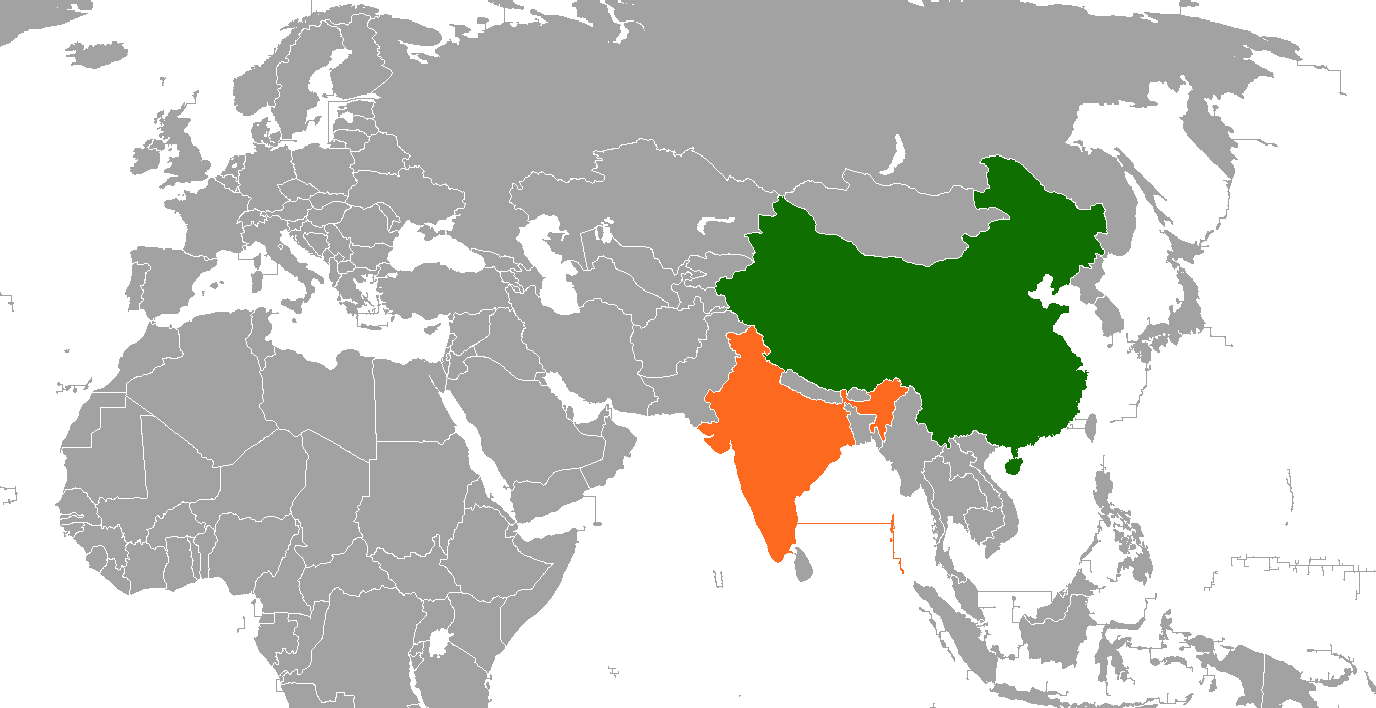 see Images name